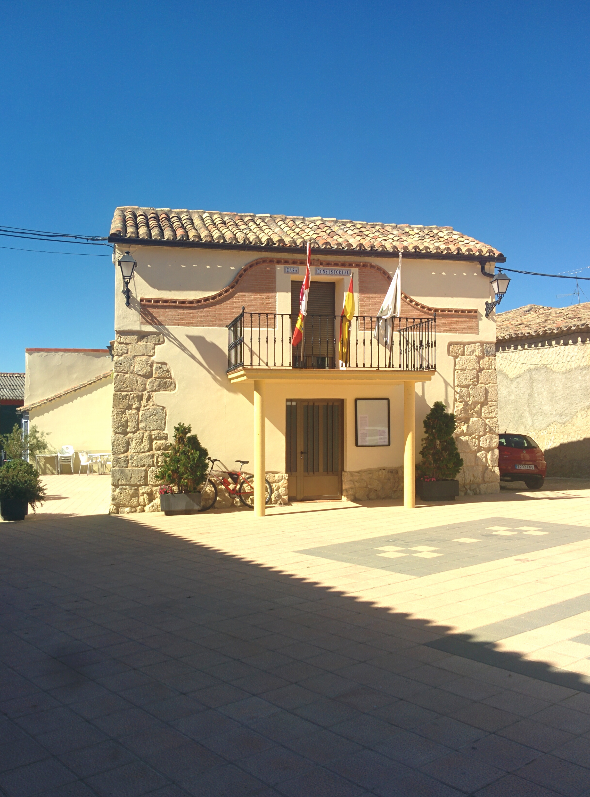 Casa consistorial de Castromembibre (Valladolid, España).